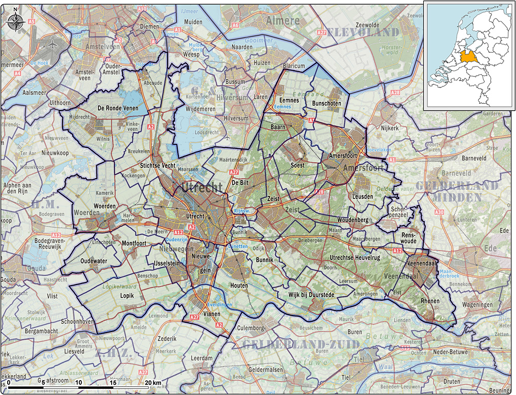 Kaart van Veiligheidsregio Utrecht, met indeling van gemeenten (2012) en impressie van het landschap. Referentie-ondergrond (kustlijn, steden, wegen) gerasterd uit de OpenStreet Map OSM. Inhoud is beschikbaar onder de Creative Commons Attribution-ShareAlike 3.0 license. Referentie-ondergrond op water bewerkt vanuit Gebruik is vrij met bronvermelding NLR en ESA. Vectorgrenzen van gemeenten op basis van het vrij te gebruiken geo-bestand van het CBS. Hoogte-aanduidingen (reliëf) gerasterd uit de AHN Viewer ( gebruik is vrij met bronvermelding (c) AHN, Overige kenmerken op de kaart: eigen tekenwerk.